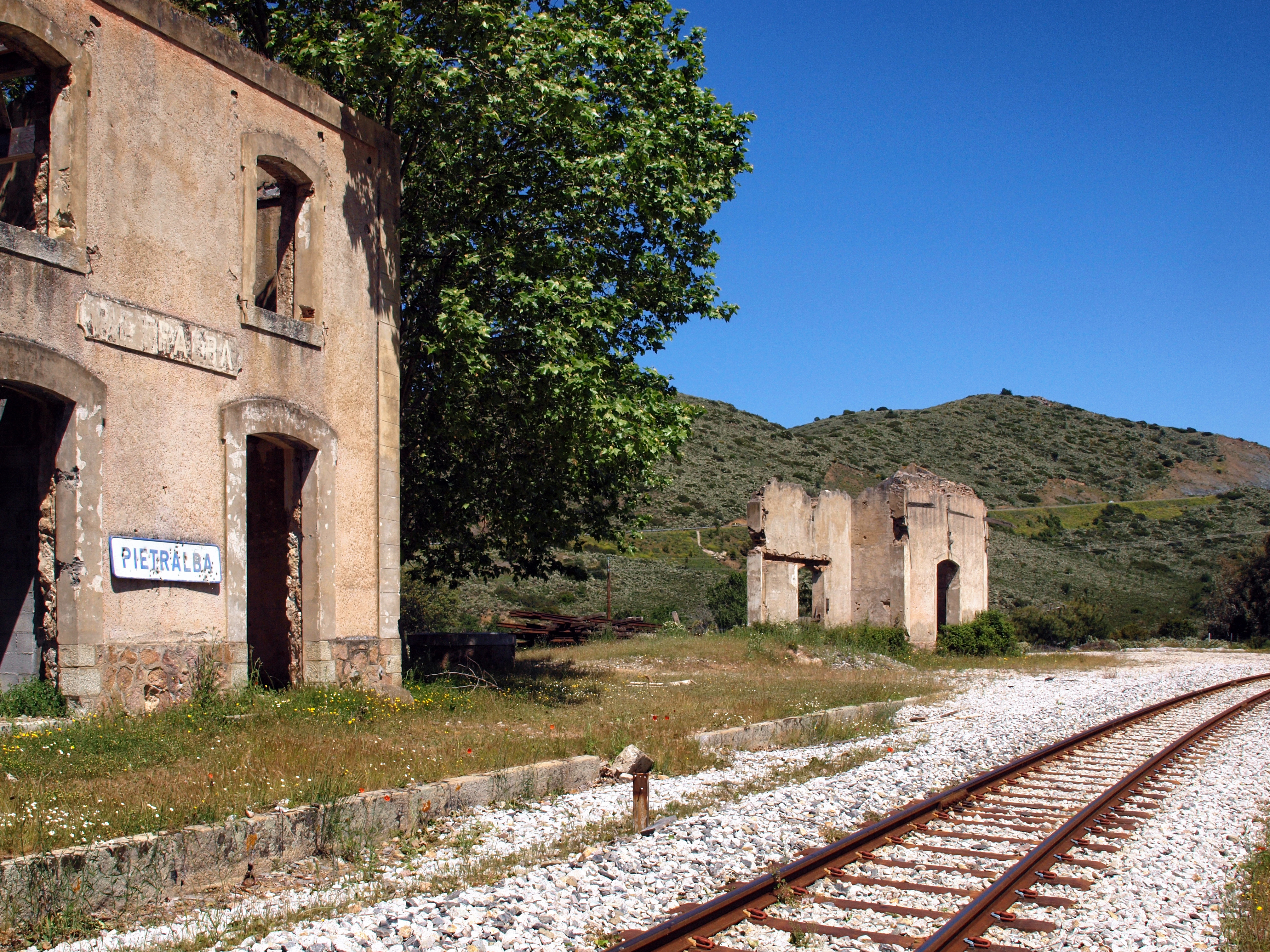 Pietralba, Balagne (Corse) - Anciens bâtiments de la gare désaffectée